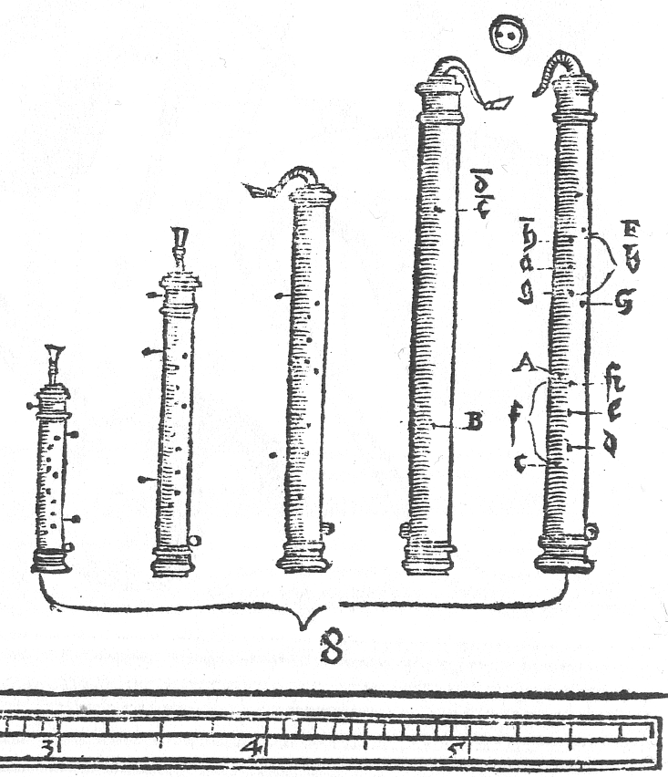 "Ein S[t]imwerck von Sordunen" (A Set of Sordinos) aus/from: Syntagma Musicum Theatrum Instrumentorum seu Sciagraphia Wolfenbüttel 1620